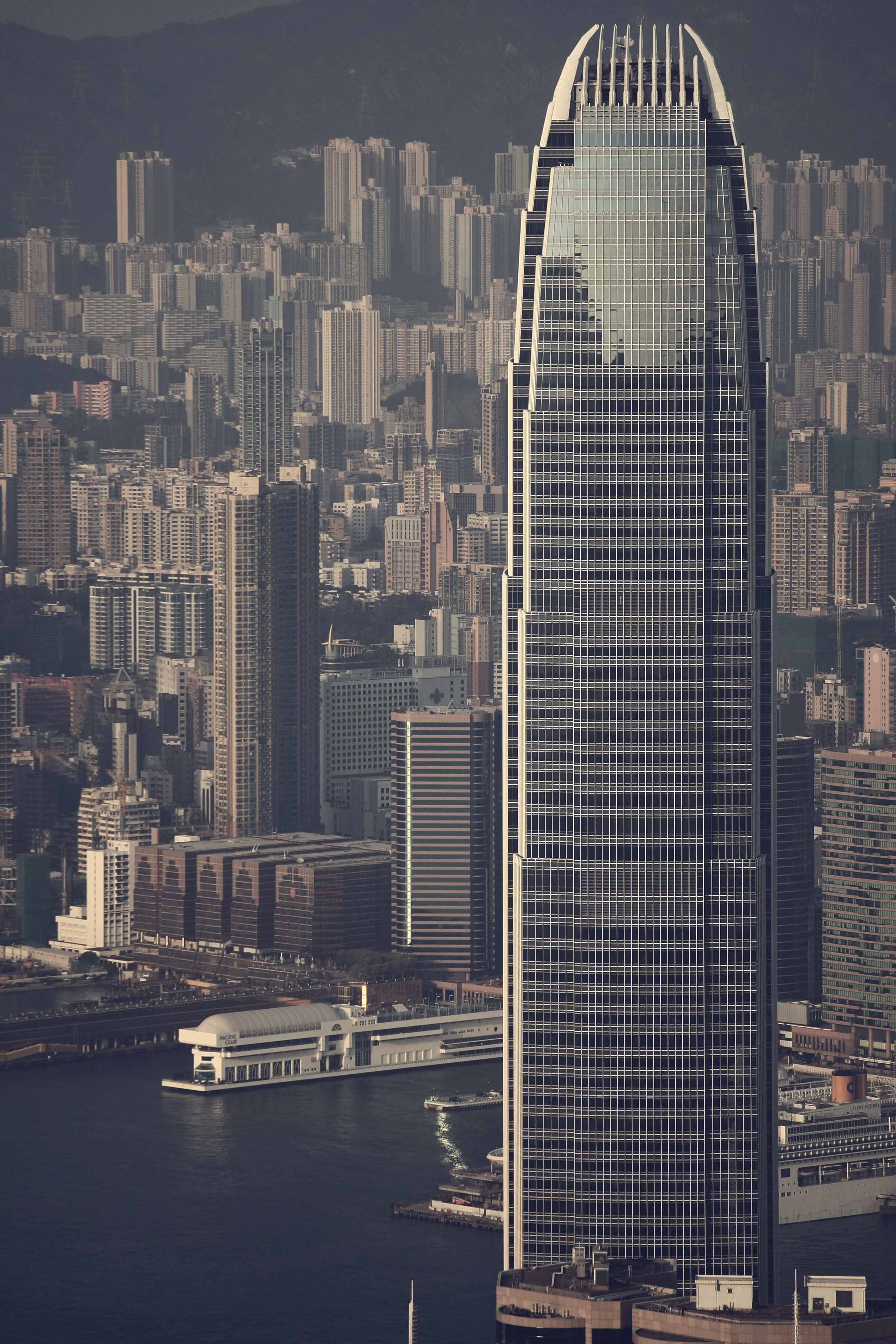 TWO IFC Skyscraper. Hong Kong Island.